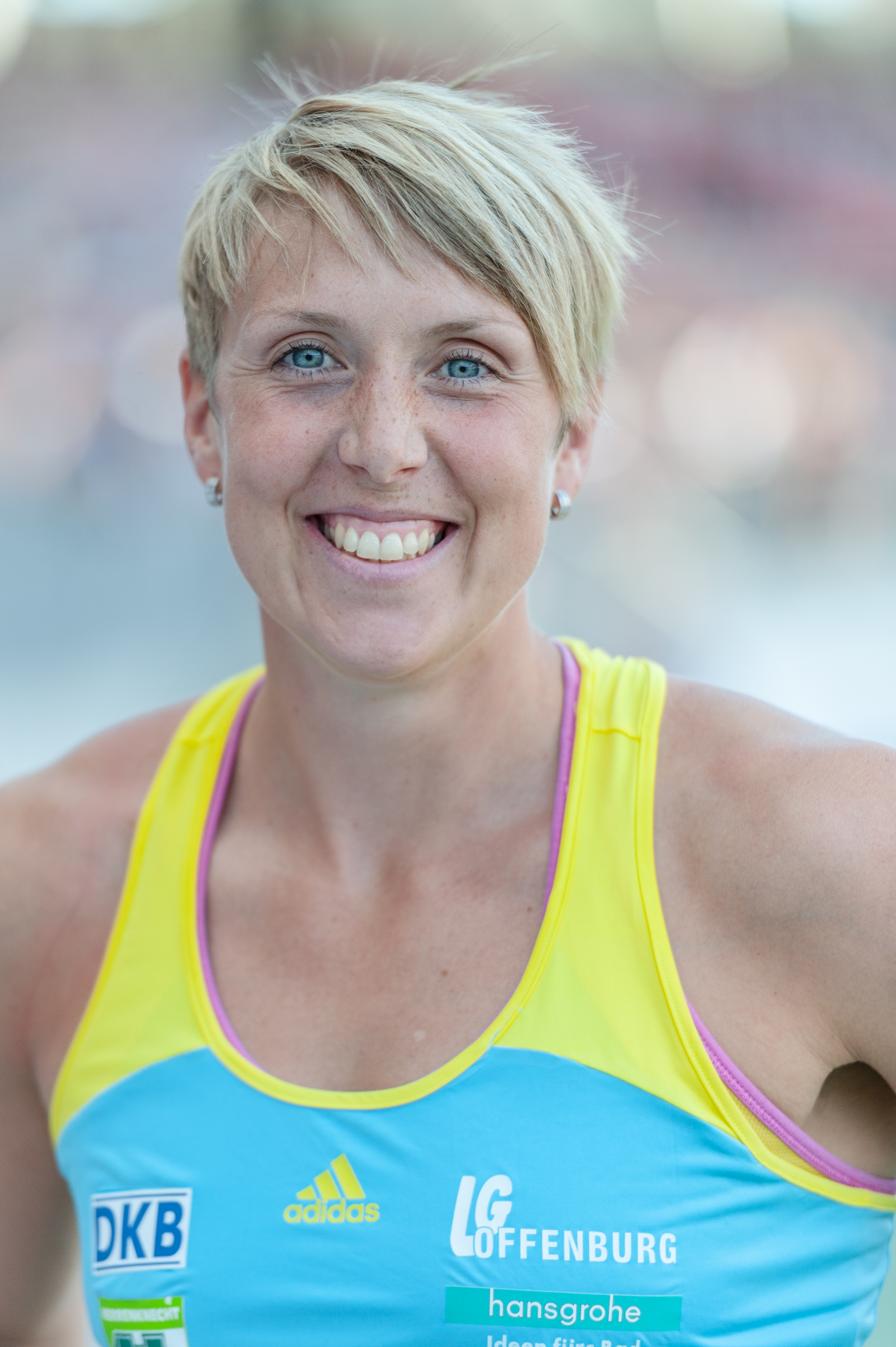 Deutsche Leichtathletik-Meisterschaften 2015: Frauen Speerwurf - Christina Obergföll, LG Offenburg